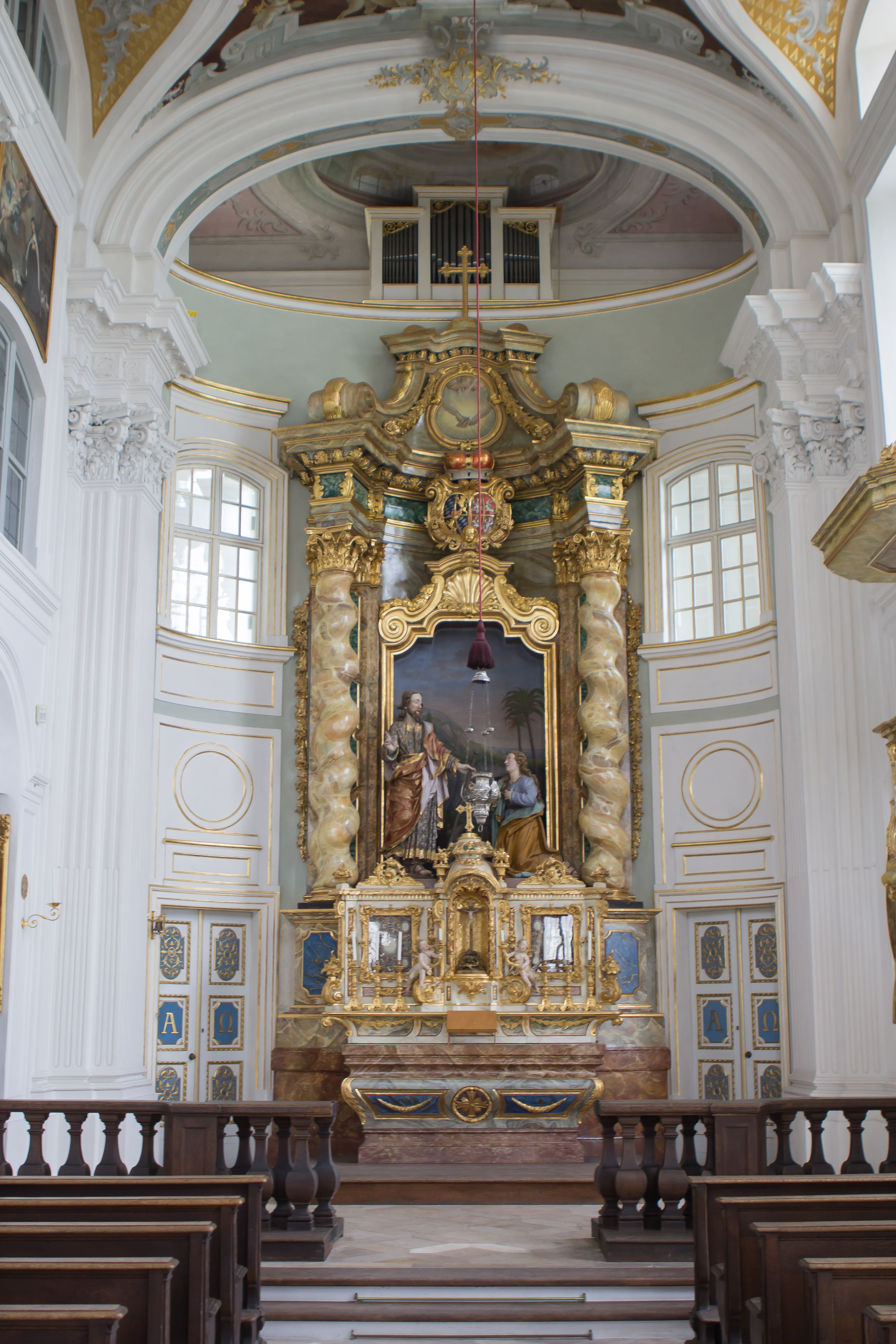 Intérieur de la chapelle du château de Nymphenburg à Munich (Munich, Bavière, Allemagne)